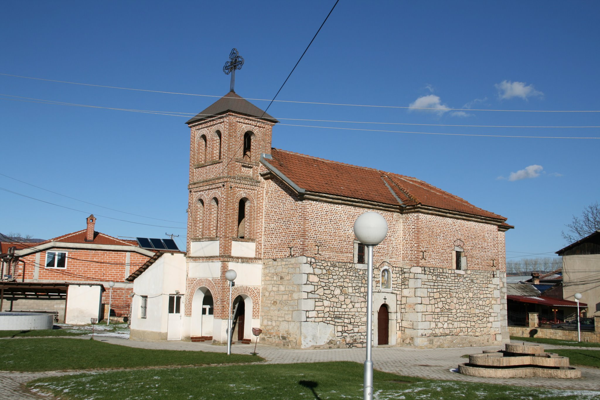 Crkva vo Mislesevo